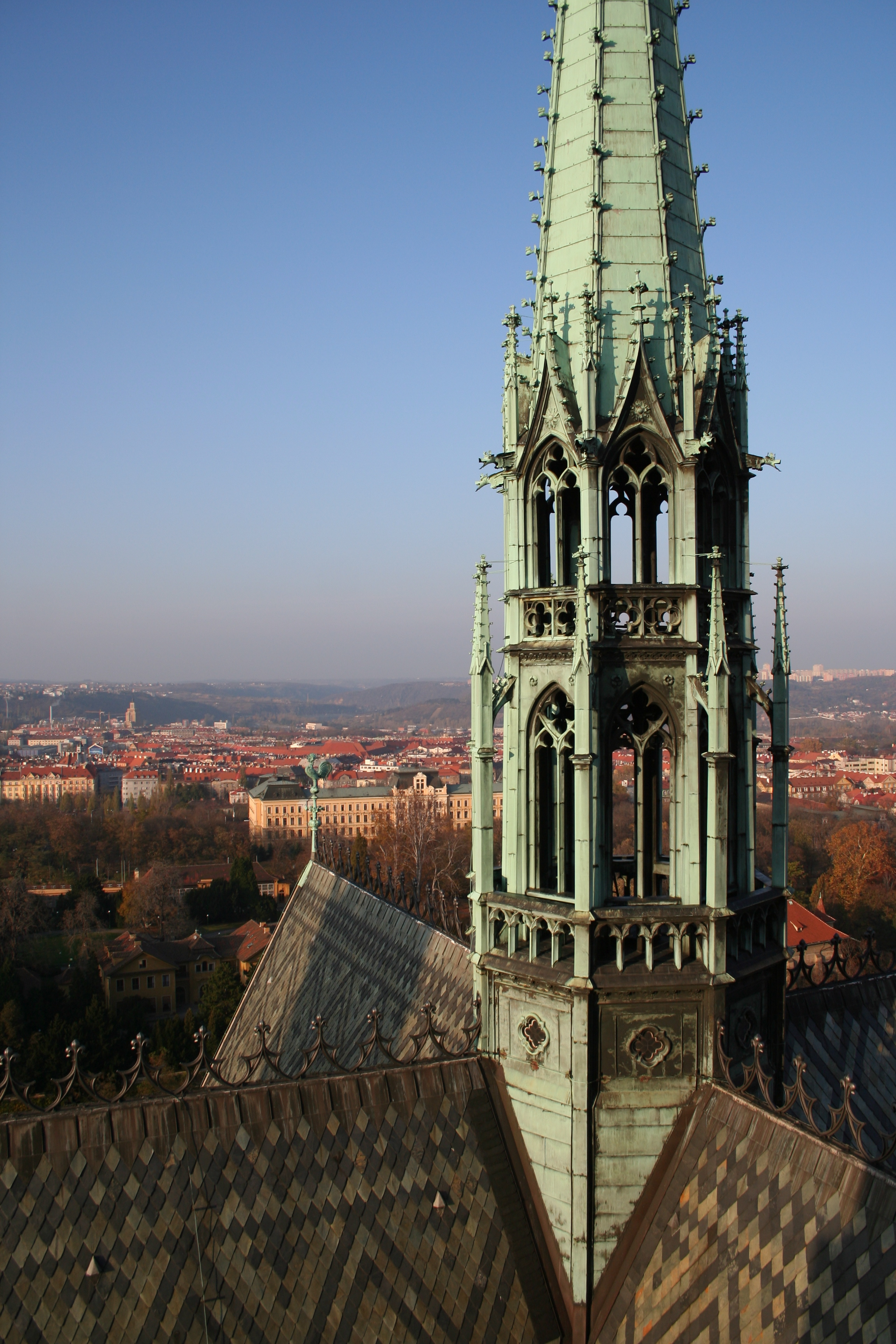 Praha, Katedrála svatého Víta, Václava a Vojtěcha